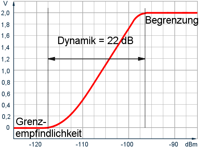 Der Bereich der Empfängerdurchlasskurve von der Grenzempfindlichkeit bis zur Begrenzung wird Dynamikbereich genannt.